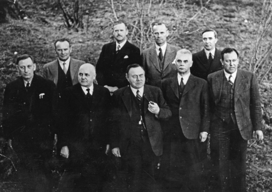 Medlemmer av regjeringen Nygårdsvold fotografert i april 1940 på "Villa Knausen" 3 km utenfor Molde. 1 rekke f.v: Sverre Søstad, Hans Ystgaard, Johan Nygaardsvold, Halvdan Koth, Trygve Lie. 2 rekke fra venstre: Olav Hindahl, Sven Nielsen, Birger Ljugberg, Anders Frihagen.